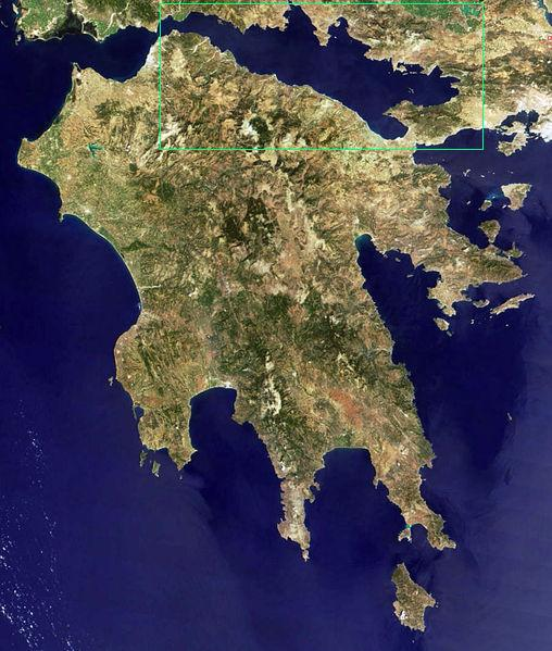 golfo del corinto